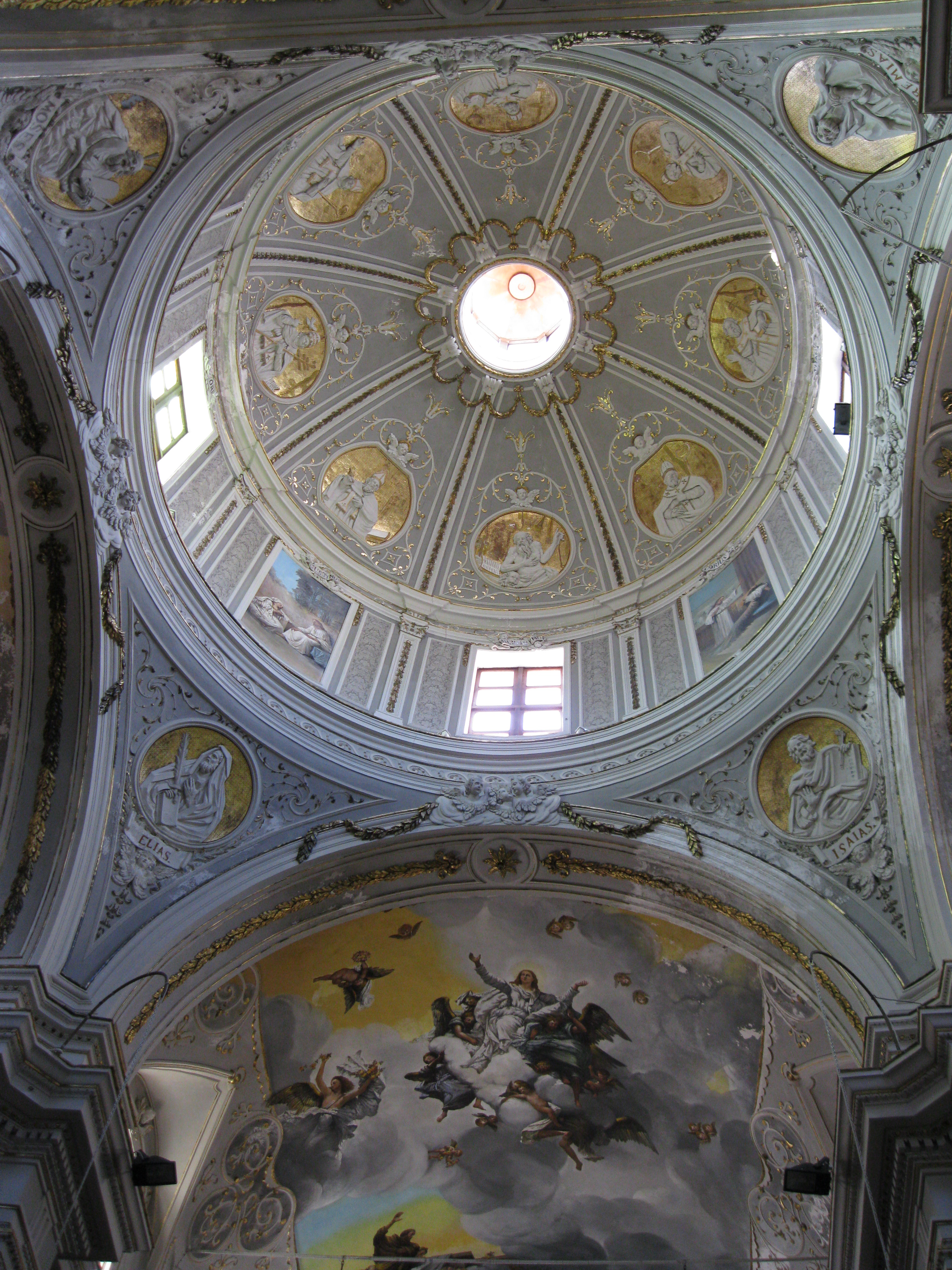 Il duomo di San Giorgio Martire a Caccamo, nella città metropolitana di Palermo.